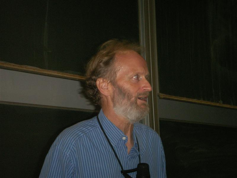 Dr. Eisenhart von Loeper